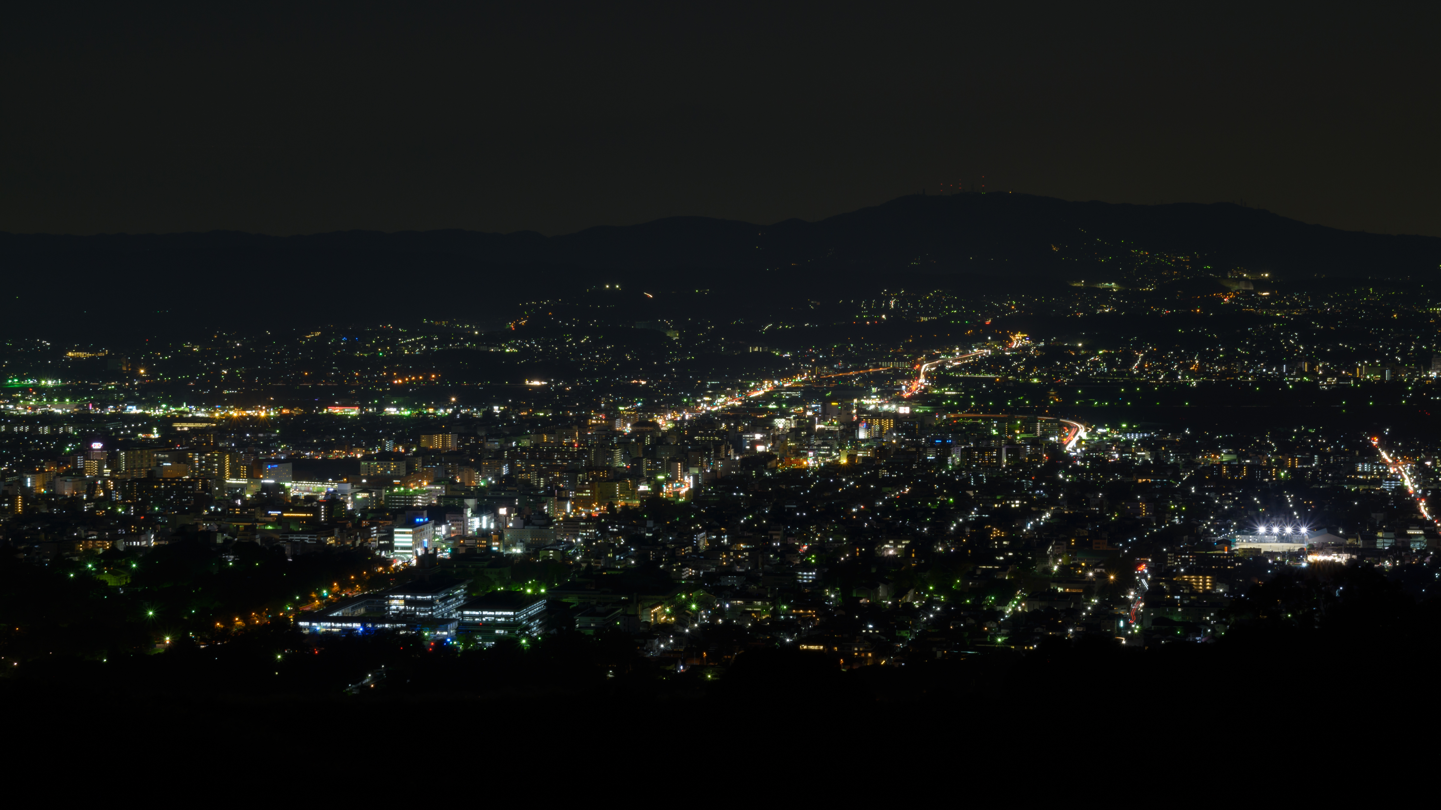 奈良の夜景。若草山山頂から奈良市街と生駒山方面を眺める。